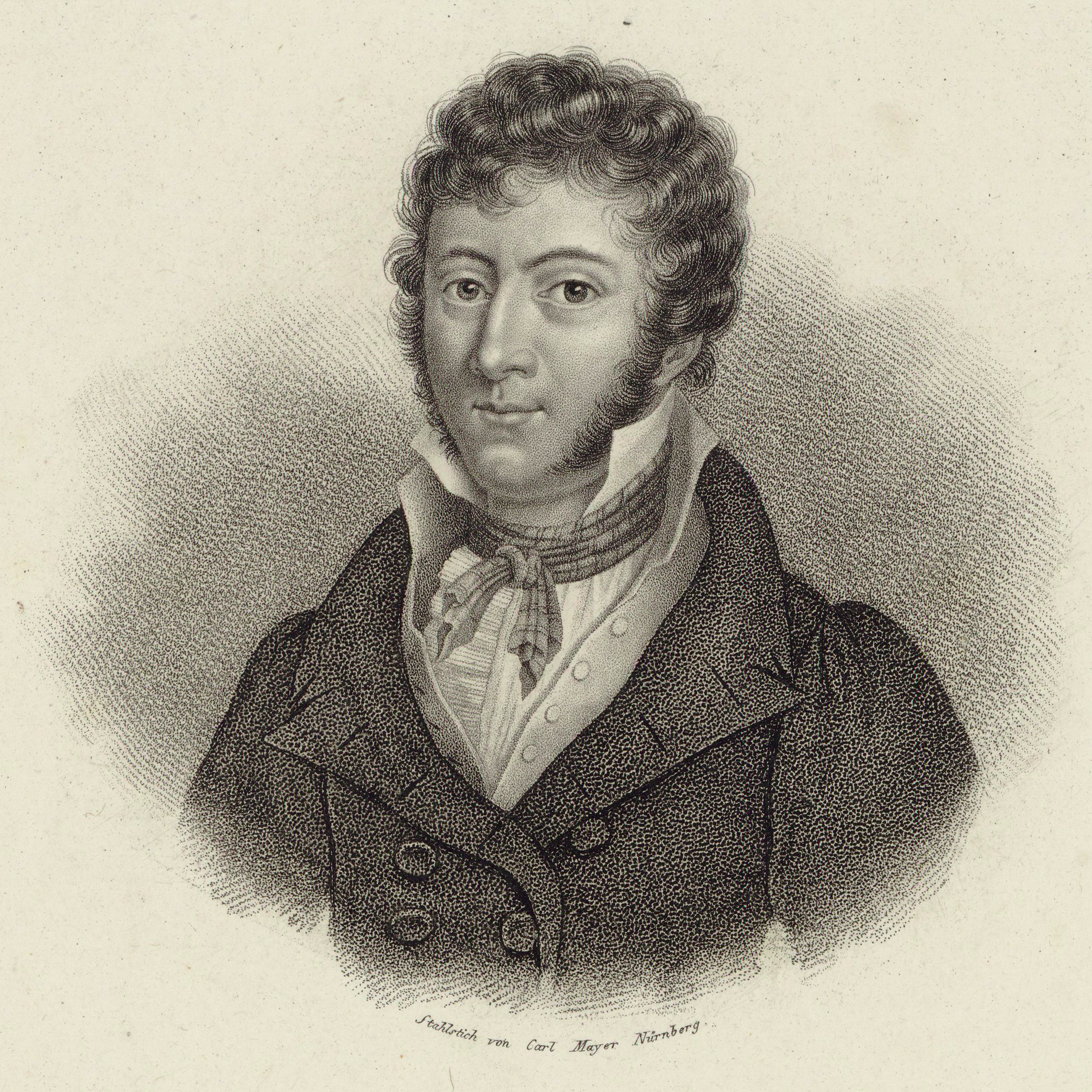 John Field (1782—1837), Komponist und Pianist, Stahlstich